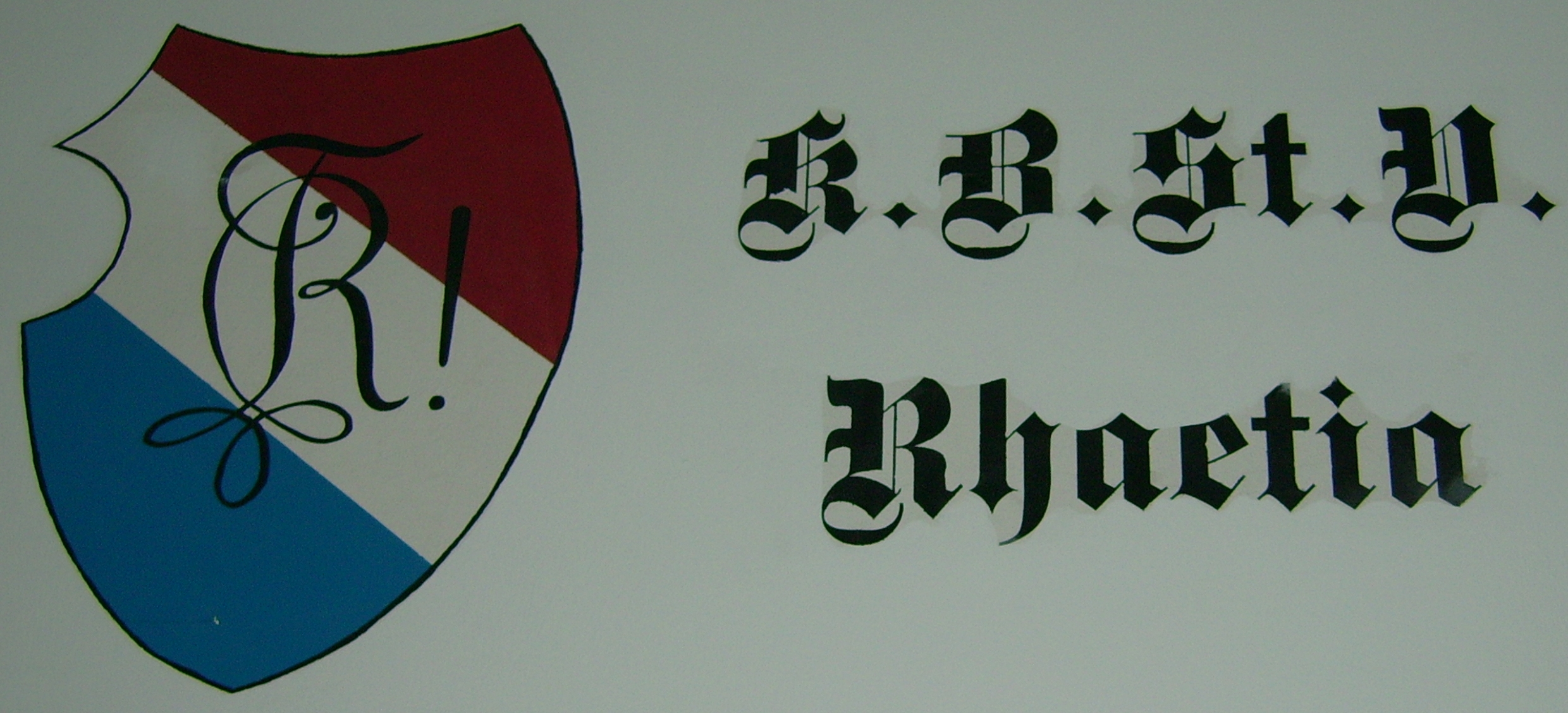 Rhaetenhaus